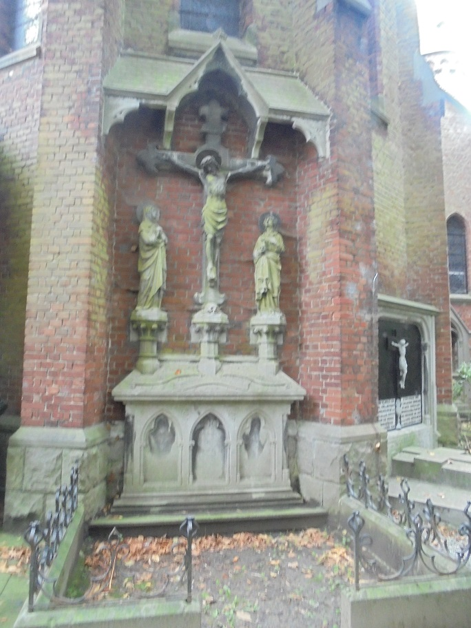 Heilig Kruisbeeld - Sint-Brixiuskerk - Markekerkstraat - Marke - Kortrijk - West-Vlaanderen - België